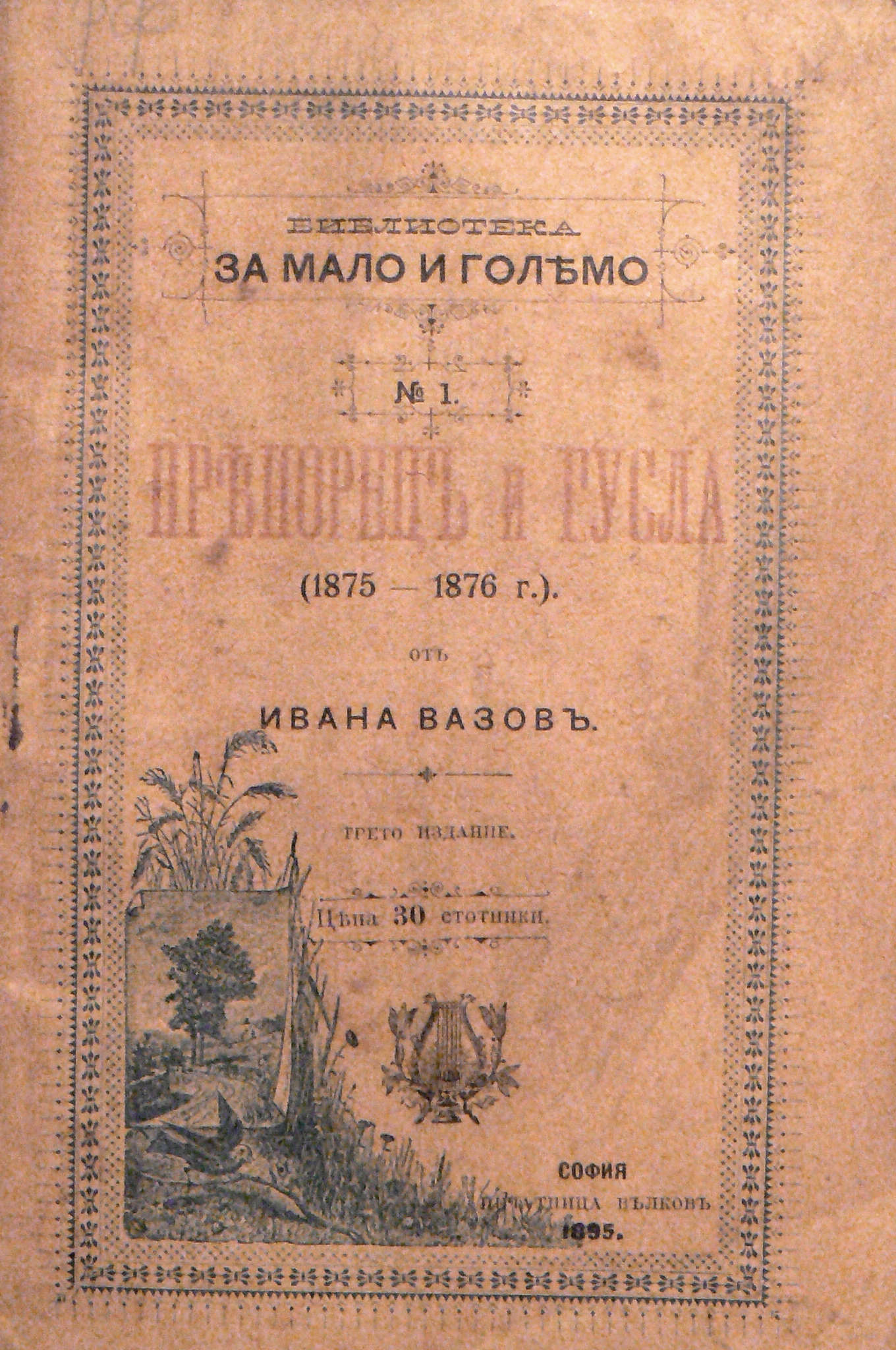 Трето издание на "Пряпорец и гусла" на Иван Вазов от 1859 г. Изложено в къщата-музей на Иван Вазов в Берковица, България